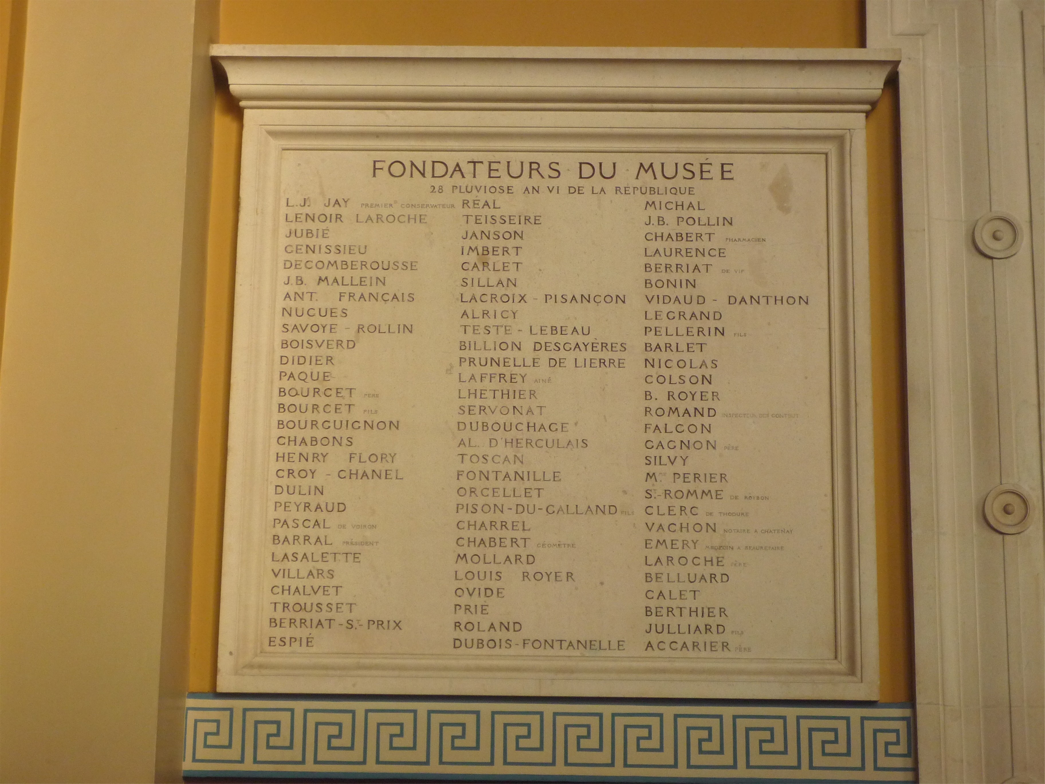 Plaque fondateurs du musée le 16 février 1798 posée dans l'ancien musée-bibliothèque de Grenoble à son ouverture en 1872.